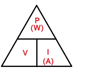 வாட் அலகு